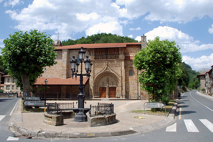 Iglesia de Santa María de Gueñes